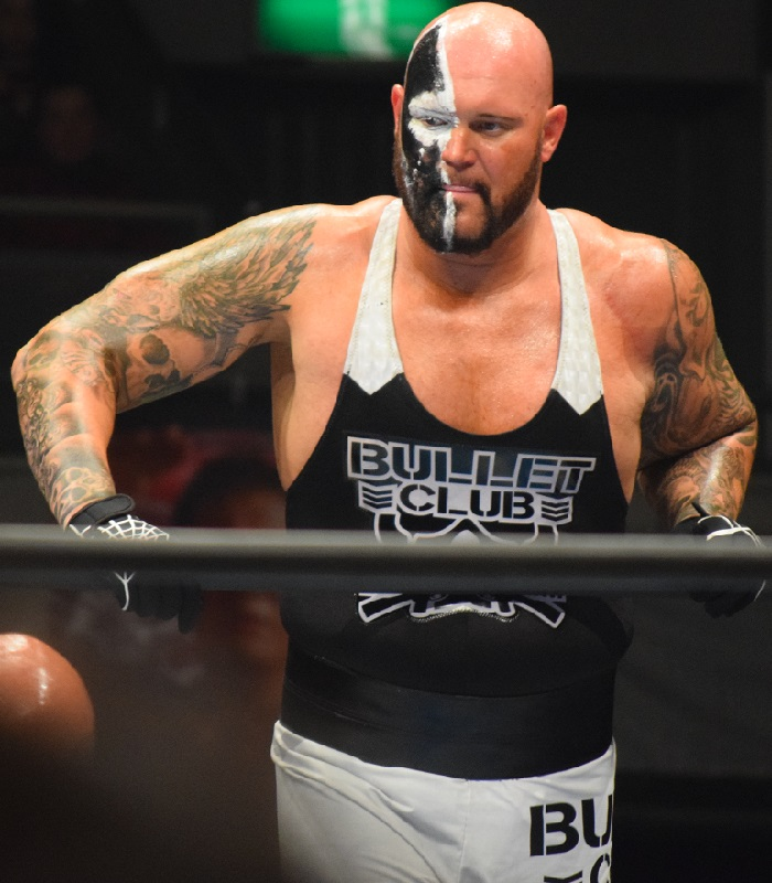 2016年2月11日 大阪府立体育会館 「THE NEW BEGINNING in OSAKA」 ドク・ギャローズ